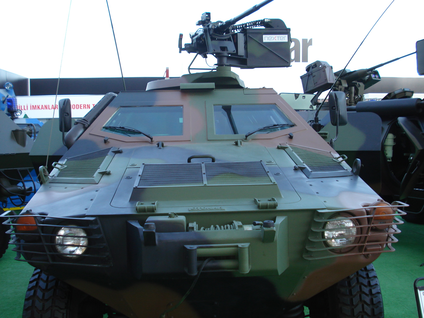 IDEF '07 Savunma Fuarı'nda çekildi.Otokar Cobra. 23 Mayıs 2007